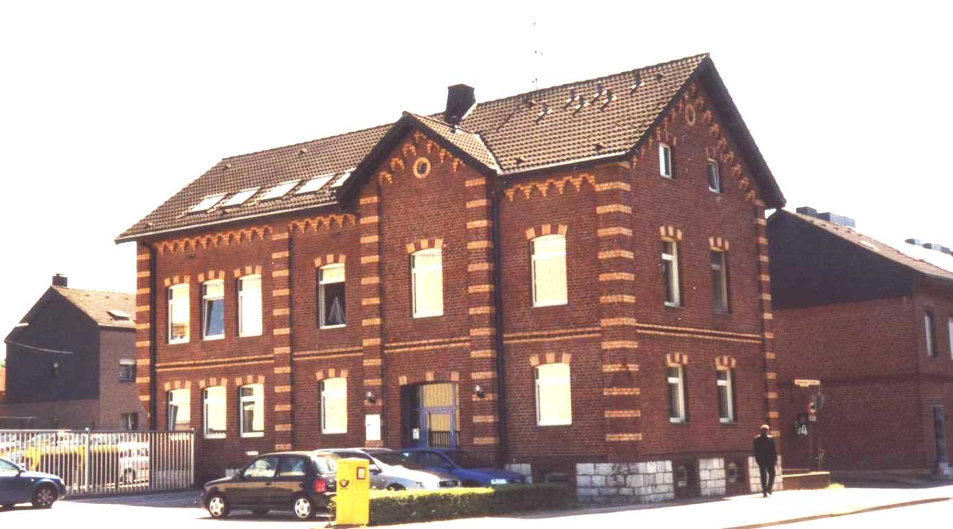 Gebäude der West Pharmaceutical Services Deutschland GmbH & Co. KG in Eschweiler